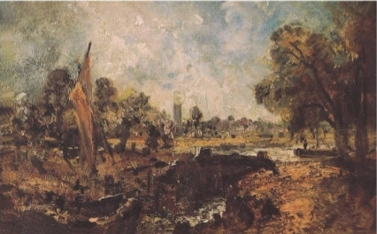 Dedham Lock, 1820 Constable appartenuto ad Albert Hecht ed in seguito ad Emmanuel Pontremoli